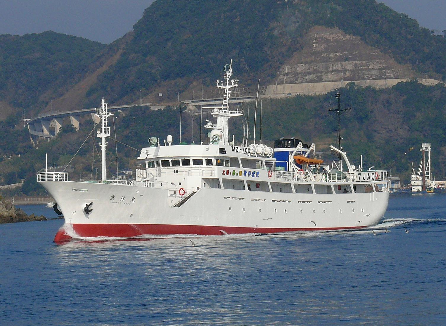 Training vessel "Shinyomal" of Miyazaki Kaiyou high school(Japan,Miyazaki,Miyazaki-City). 宮崎県立宮崎海洋高等学校に所属する実習船の進洋丸。 長崎港を出港した所を遊覧船より撮影。